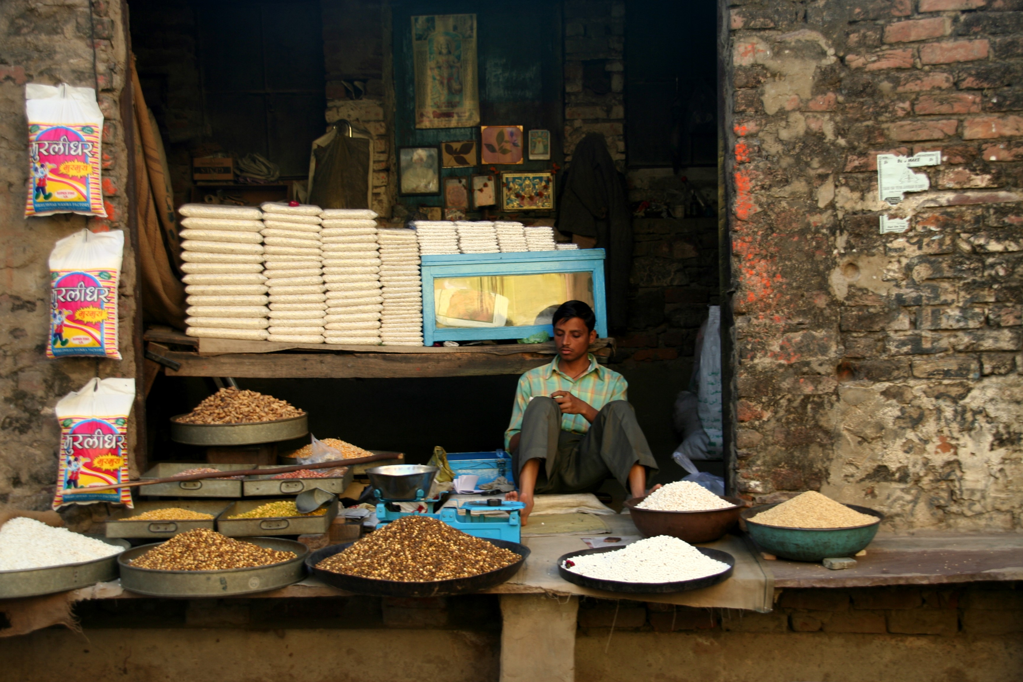 A shop in Pushkar.